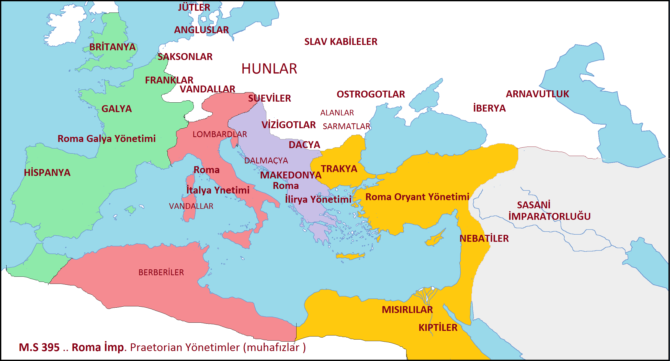 Roma İmp Praetorian Yönetimler MS_395